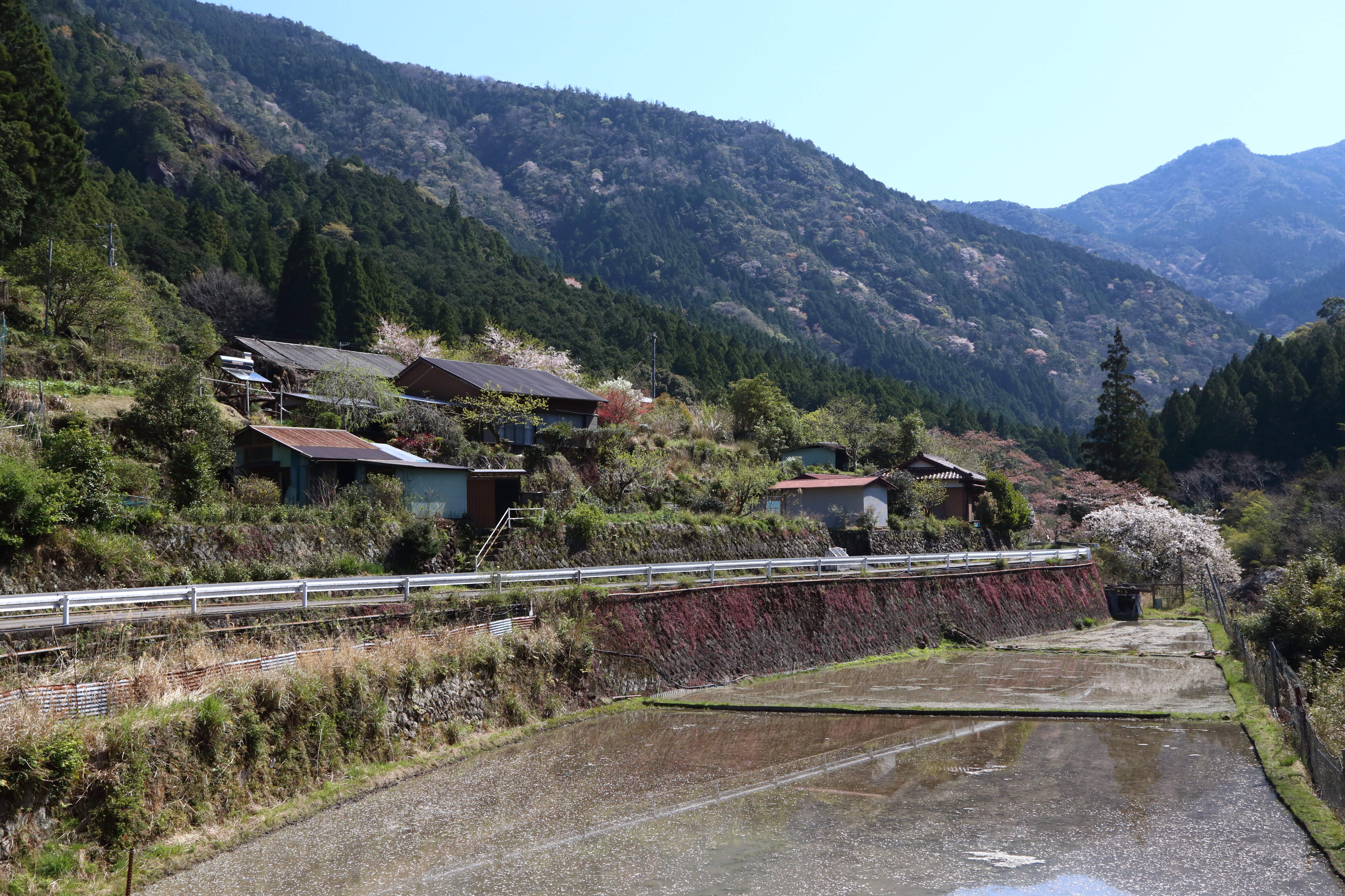 大河内三浦地区 三重県熊野市 紀和町大河内